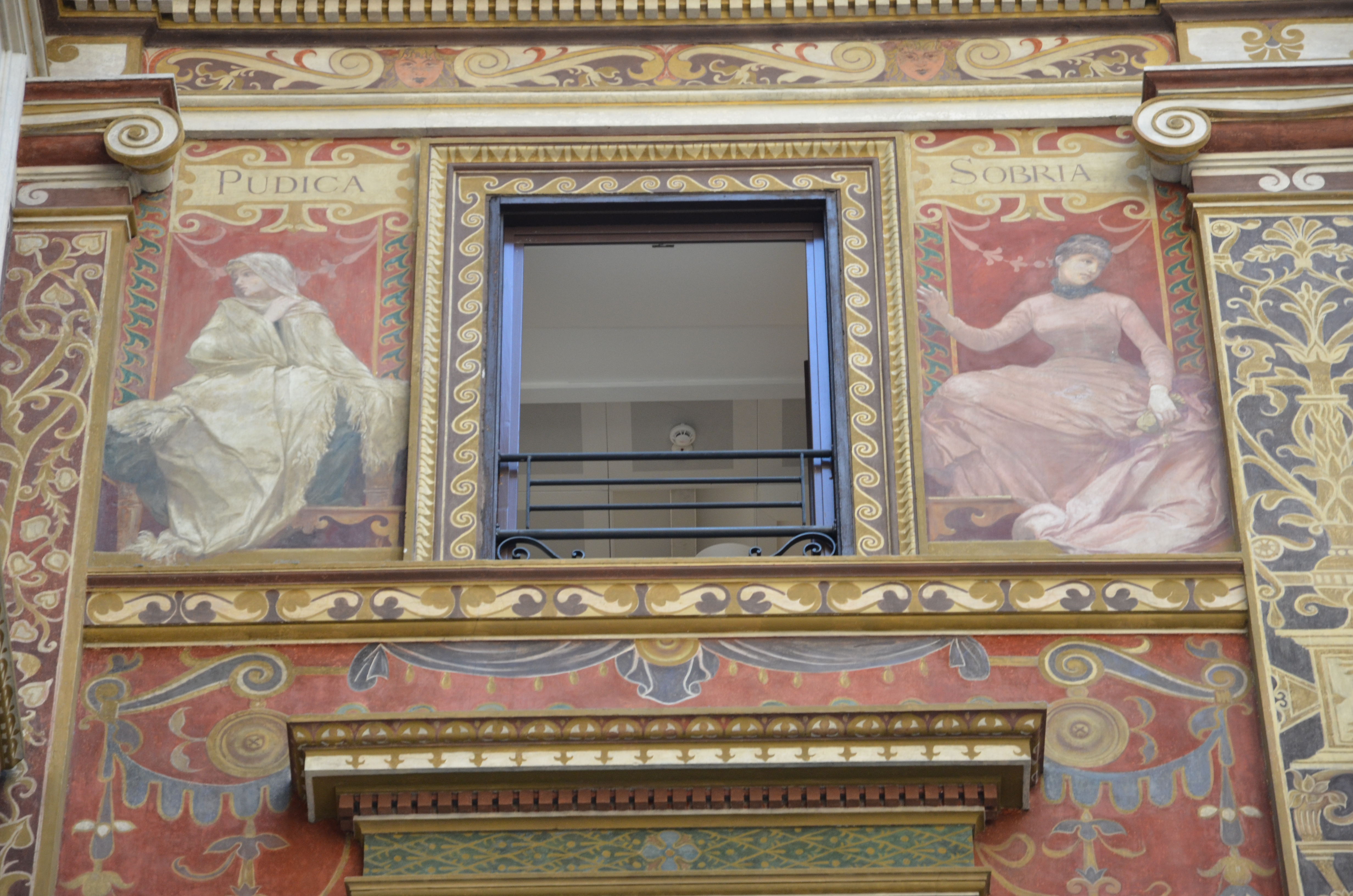 GALLERIA SCIARRA - ROMA